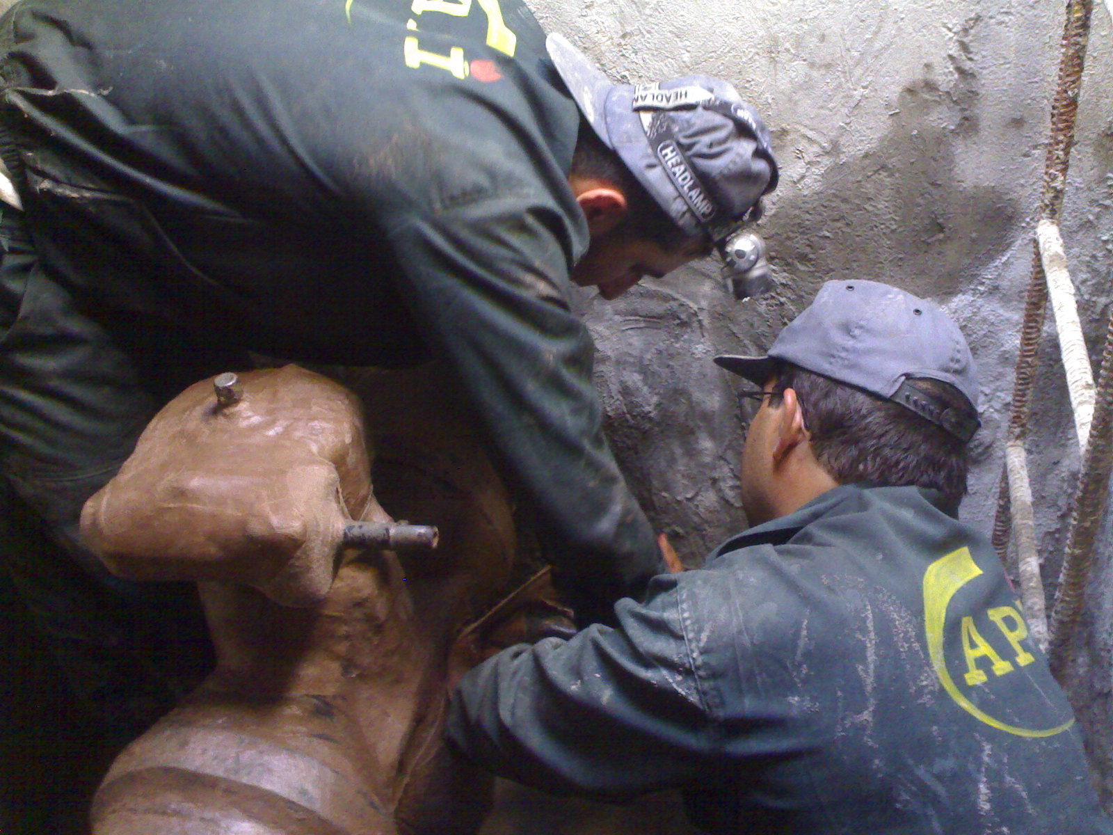 شیرآلات فولادی که در مقابل خوردگی مقاوم نیستند باید با مواد مناسب پوشش داده شوند.